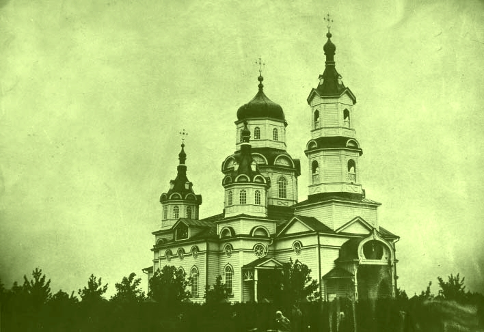 Церква Святителя Миколи Мирлікійського. с. Білики (Кобеляцький р-н, Полтавська обл.). Фото початку ХХ ст.